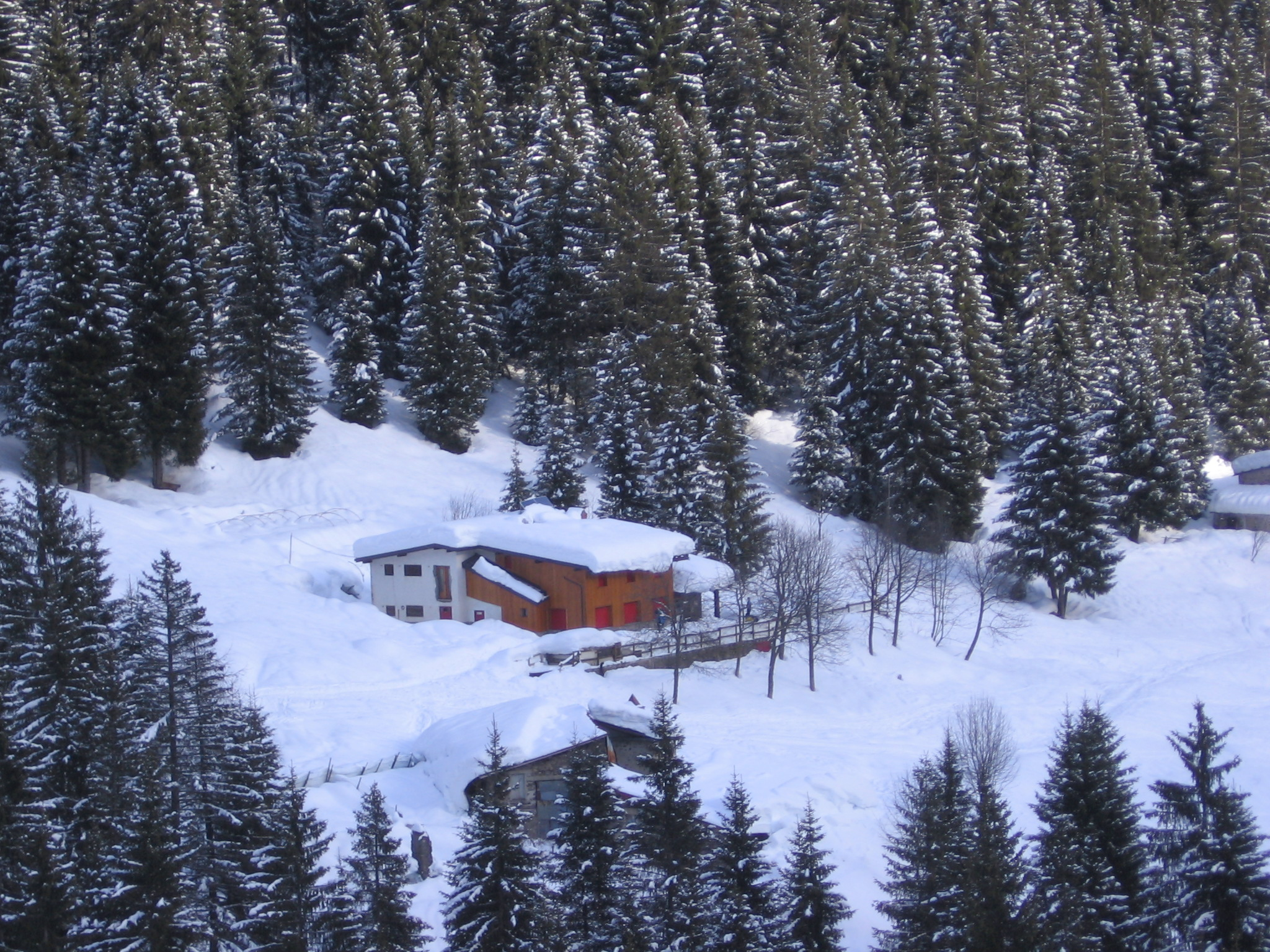 Rifugio Alpe Corte, Valcanale, Bergamo, Italy